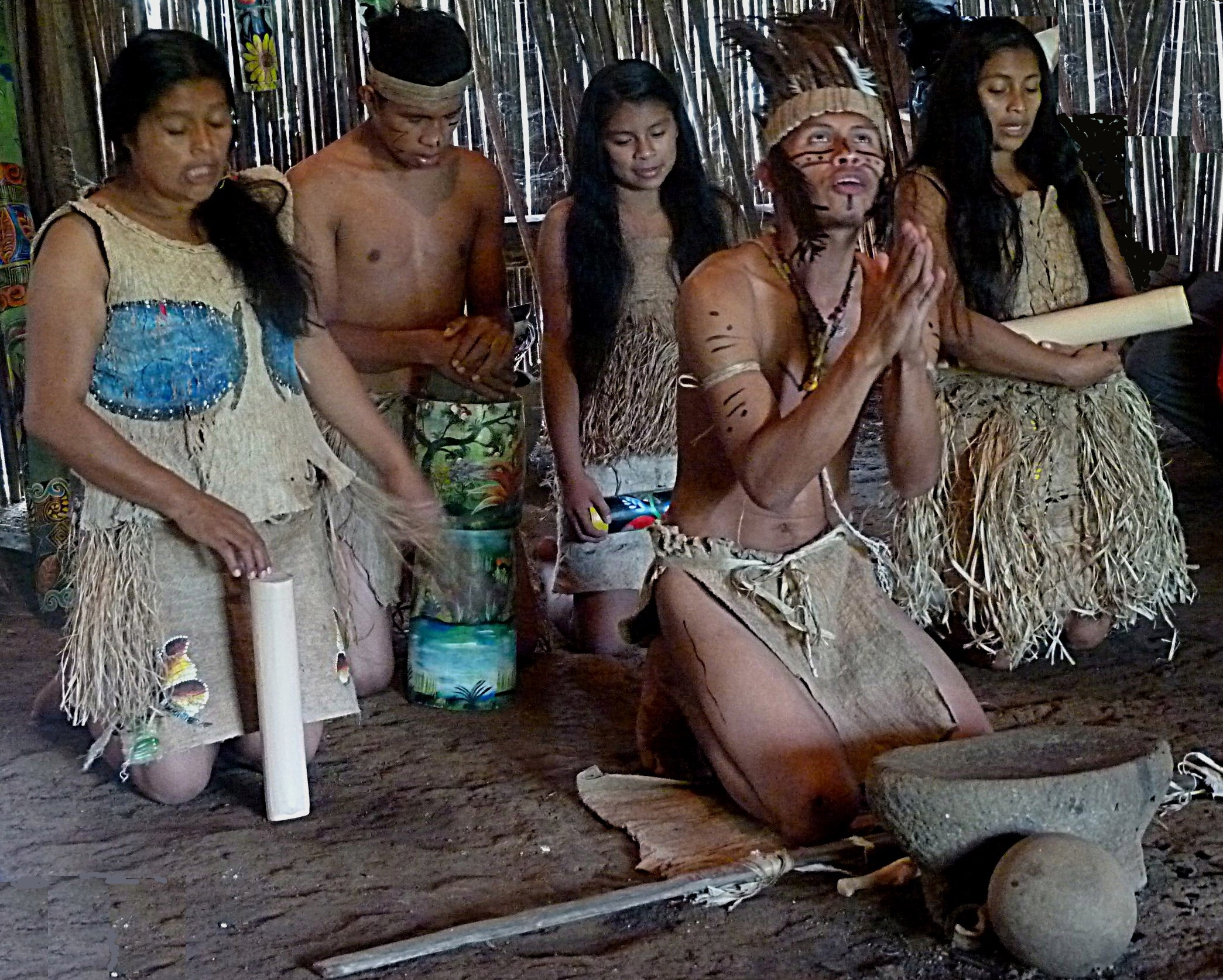 Cérémonie "Dieu, nature et homme", Palenque Tonjibe (village), région de Guatuso, Costa Rica.